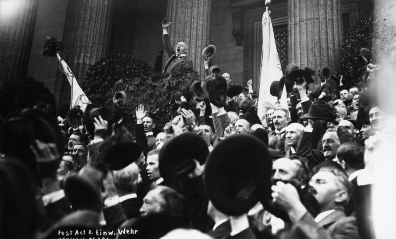 Festakt der Einwohnerwehren, Königsplatz 26.9.20 (Landeshauptmann [Georg] Escherich)